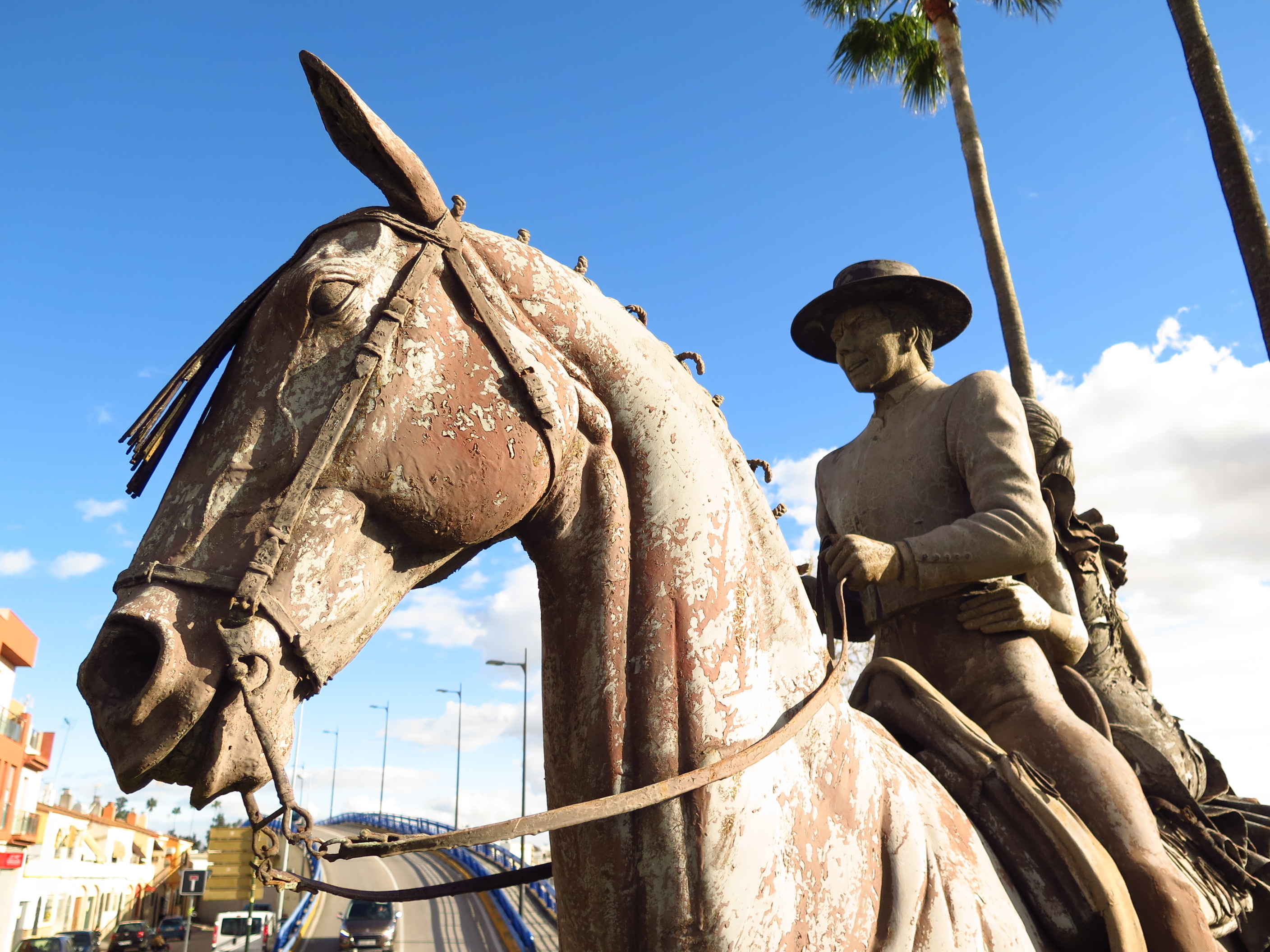 Escultura dedicada al caballo sevillano